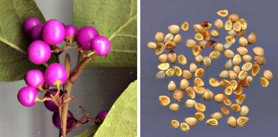 Бобице и семе кинеске каликарпе, Арборетум Шумарског факултета, Београд (аутор: Михаило Грбић)